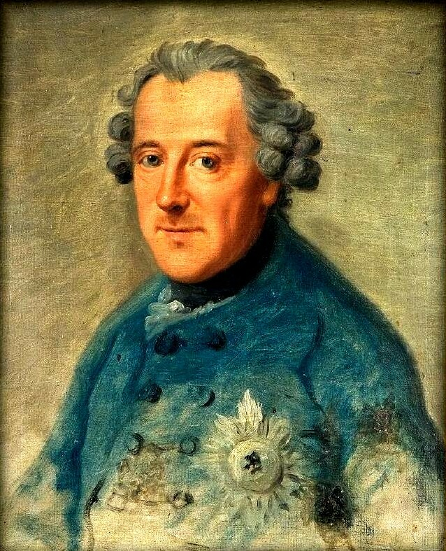 Zeitgenössisches Porträt Friedrichs II. von Preußen. Das Porträt entstand 1763 auf Schloss Salzdahlum, dem Sommersitz der Schwester von Friedrich II., Herzogin Philippine Charlotte von Braunschweig. Es handelt sich um das einzige Porträt zu dem Friedrich II. während seiner Regierungszeit, also ab 1740, Modell gesessen hat. Das Porträt wurde am Samstag, 10. Oktober 2009 im Auktionshaus Bolland & Marotz in Bremen für EUR 670.000 verkauft. Das Bild wird als deutsches Kulturgut eingeschätzt, weshalb es auch nach dem Verkauf in Deutschland verbleiben musste.